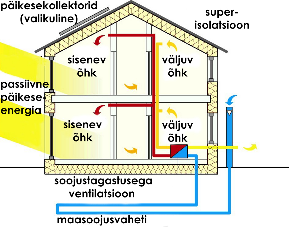 Passiivmaja skeem